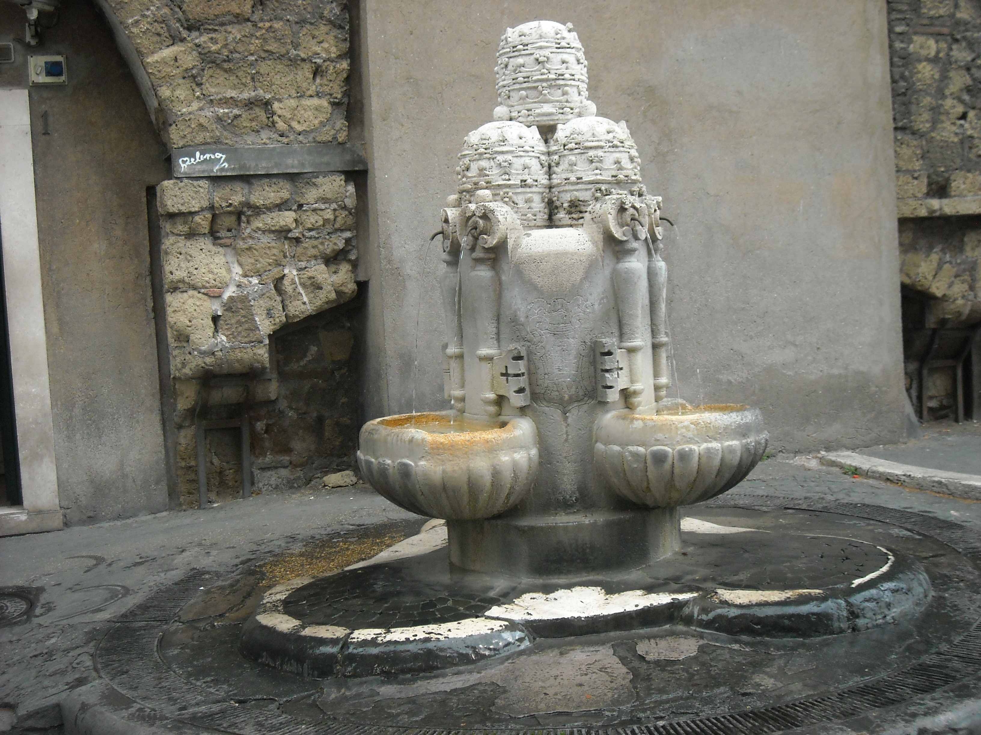 Fontana rionale situata nel Rione XIV (Borgo) di Roma, tra il Colonnato di piazza San Pietro e il "Passetto di Borgo"